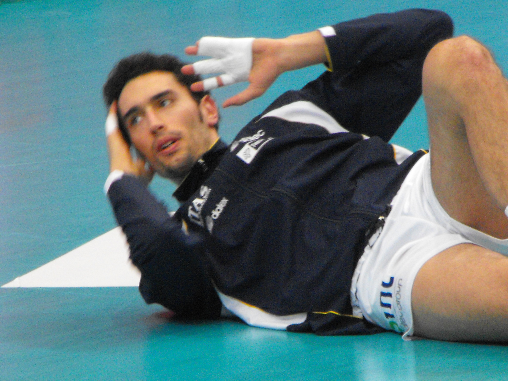 Emanuele Birarelli, centrale italiano